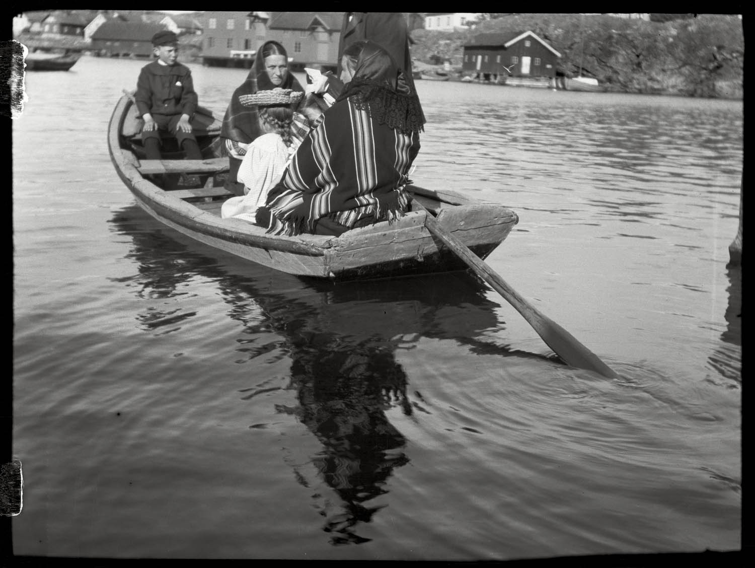 Kyrkfolk i båt.